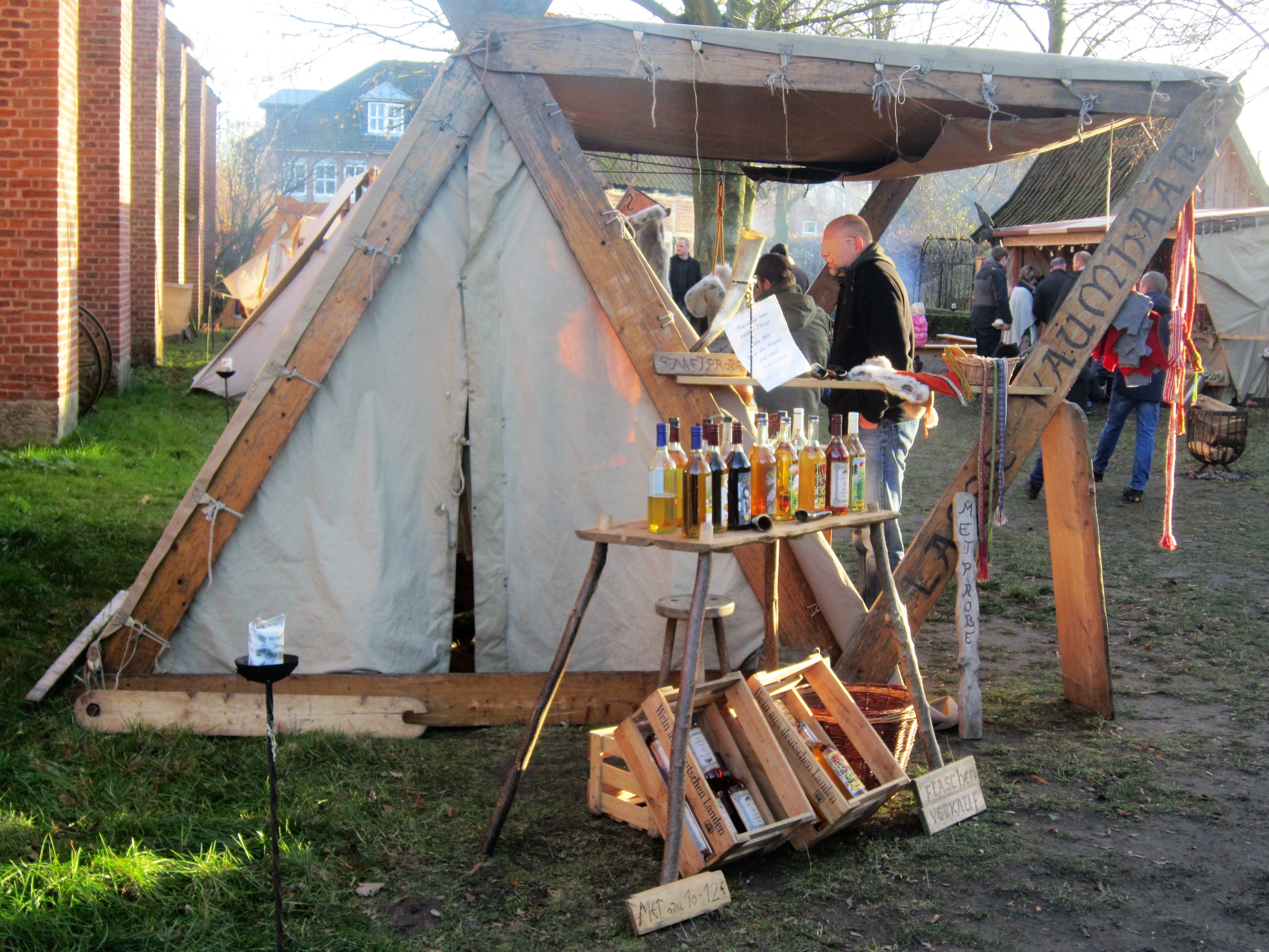 Mittelalterlicher Barbaramarkt beim Museum im Zeughaus Vechta